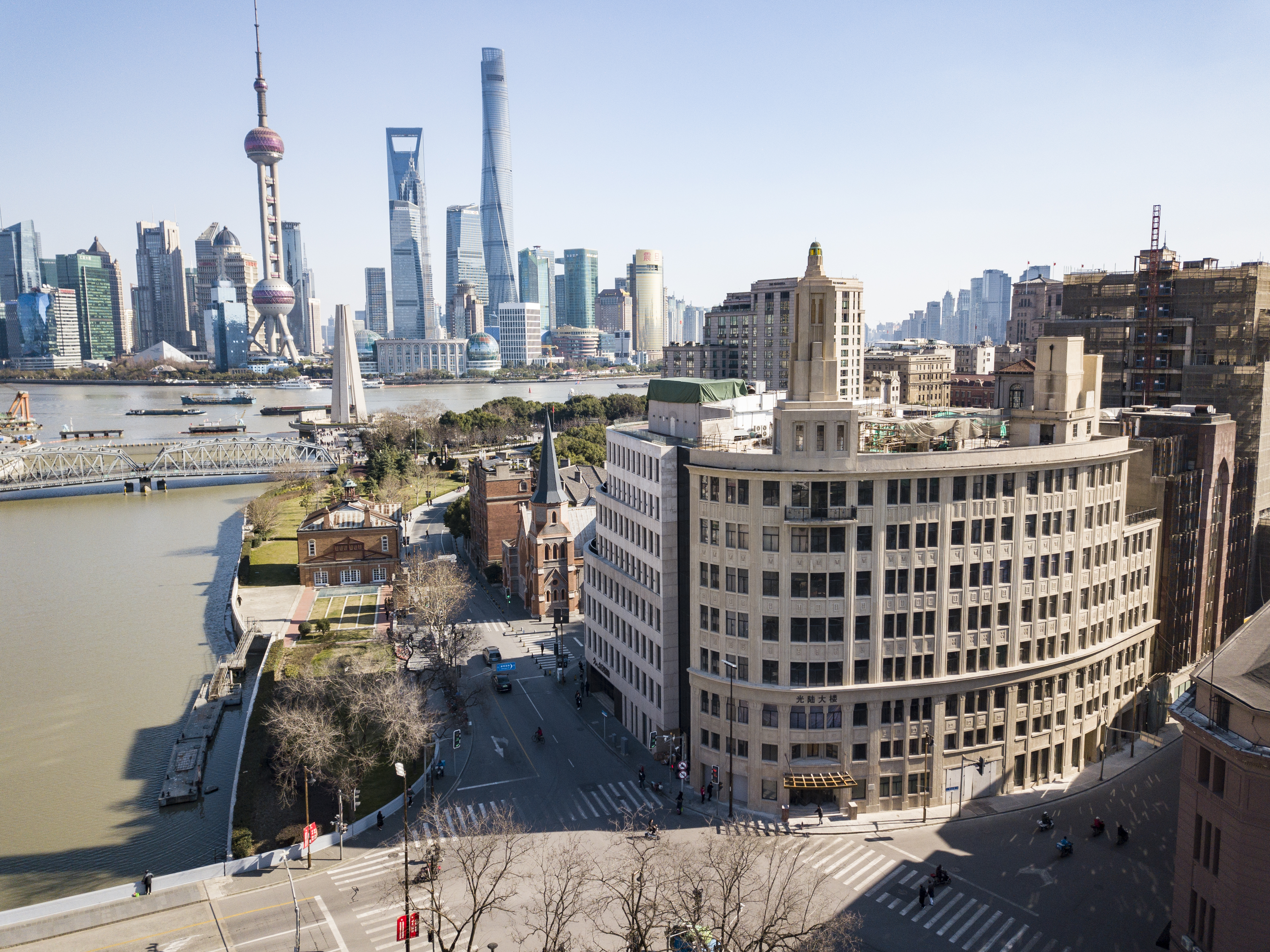 中文（中国大陆）: 光陆大楼及陆家嘴·航拍